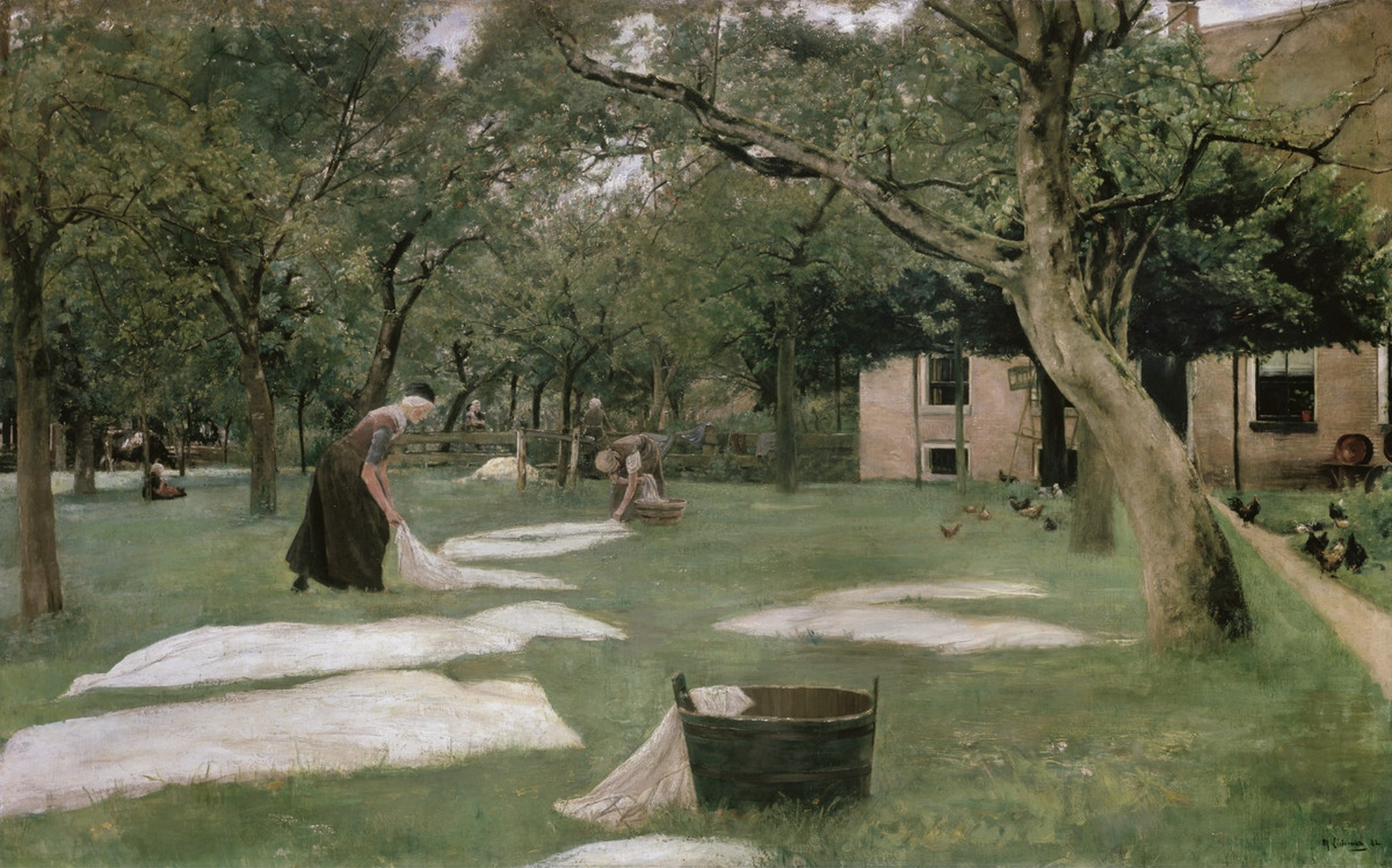 Darstellung der Herberge von Jan und Lammechien Mensel, Haus, Zweeloo